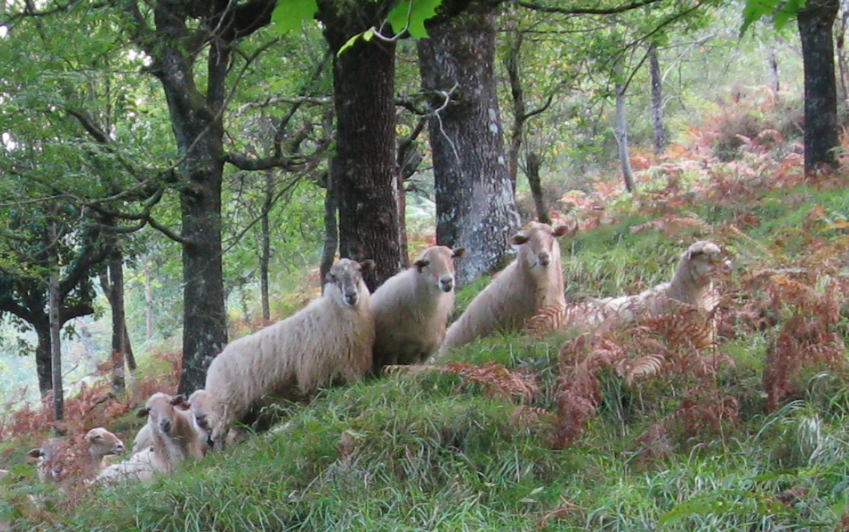 brebis manech à tête rousse (Ituren en Navarre) (Pyrénées).